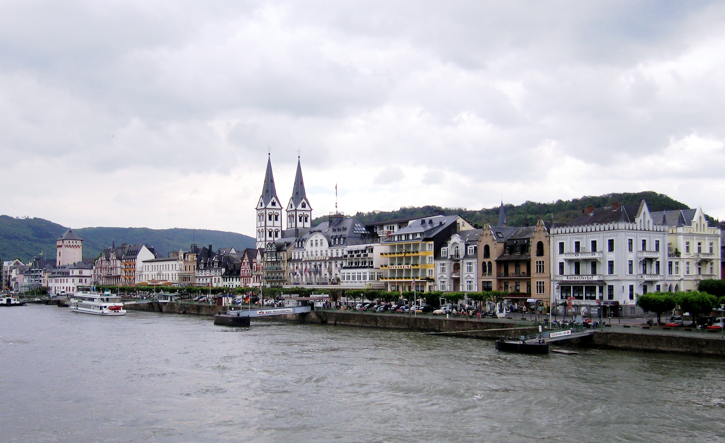 Boppard